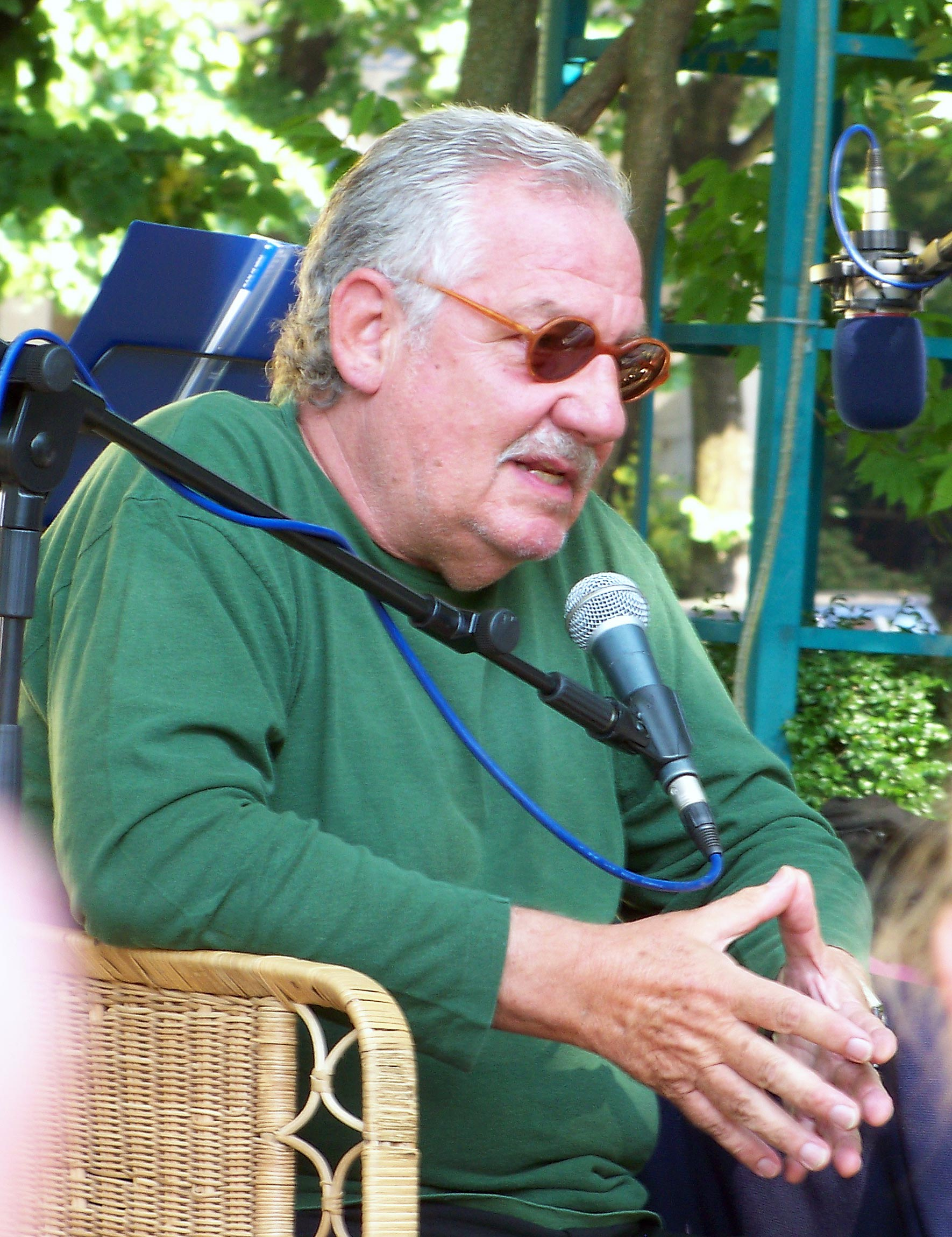 Ritratto del cantautore Giorgio Conte nel 2009